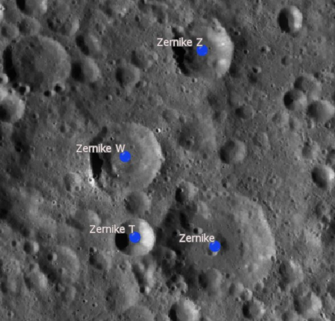 Cráter lunar Zernike. Cráteres satélite. (Imagen LRO)